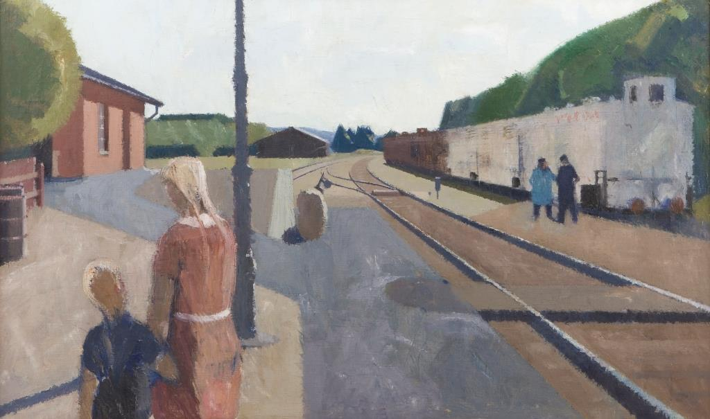 Firetoget